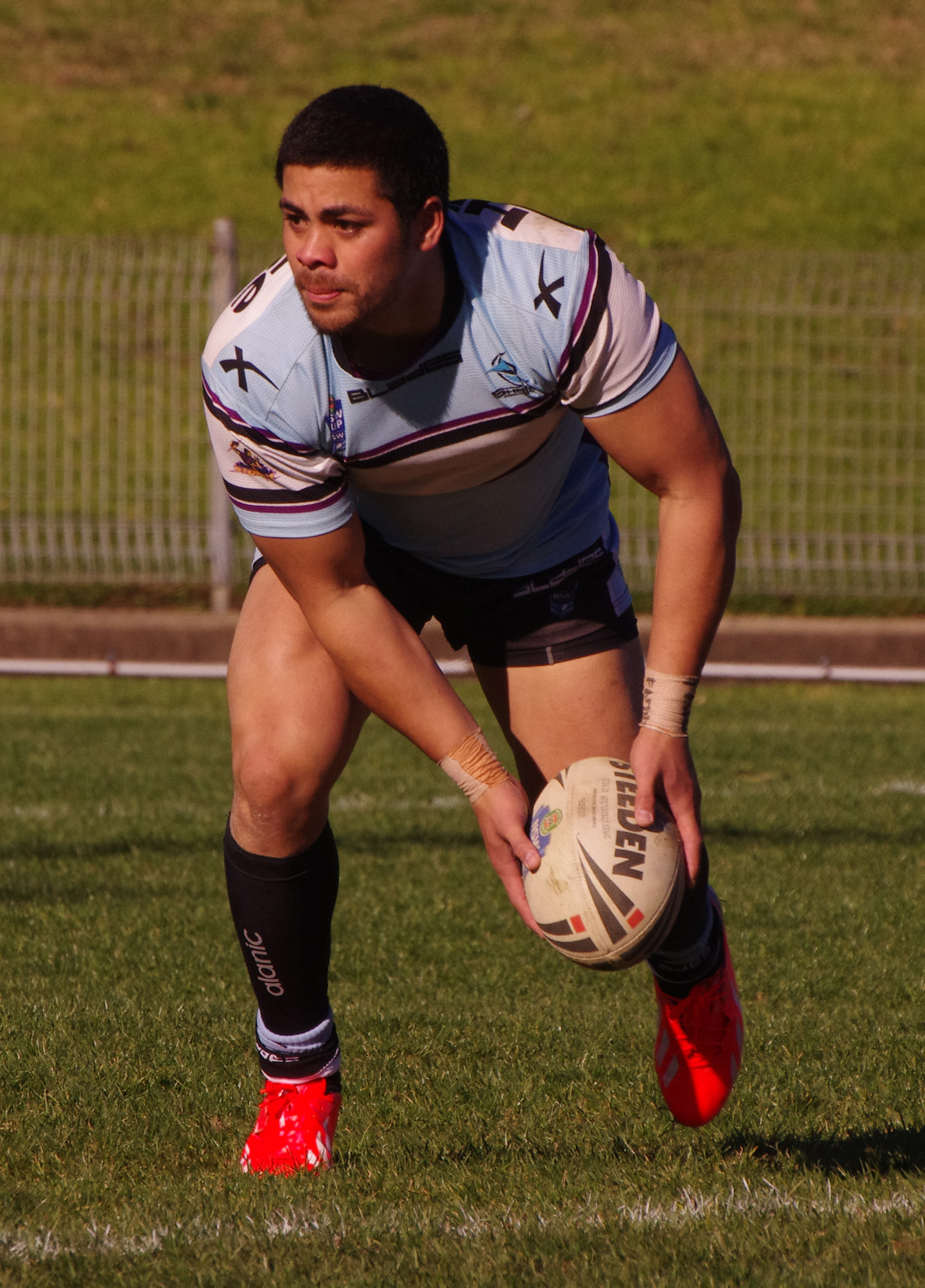 YOUNG TONUMAIPEA